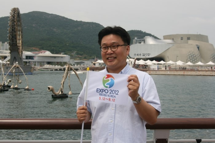 교수 서경덕